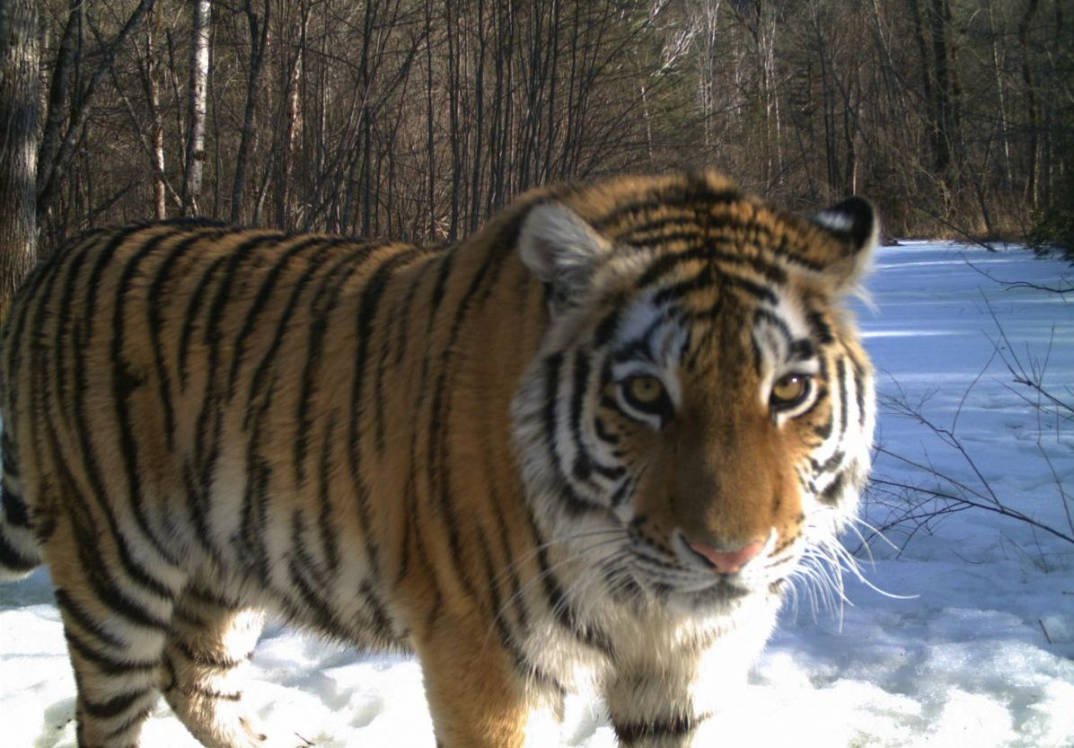 Тигрица Золушка. Бастакский заповедник.